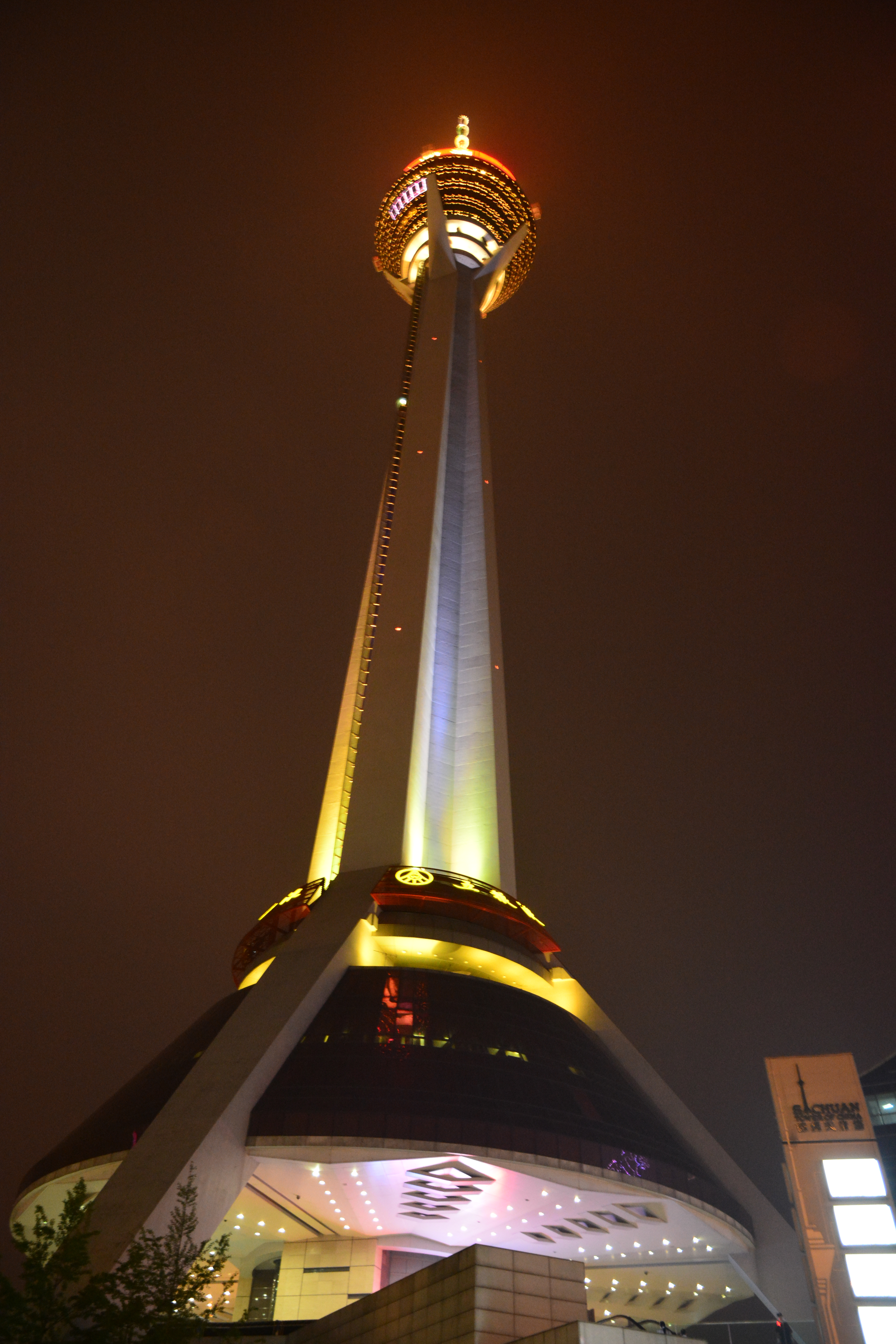 四川广播电视塔